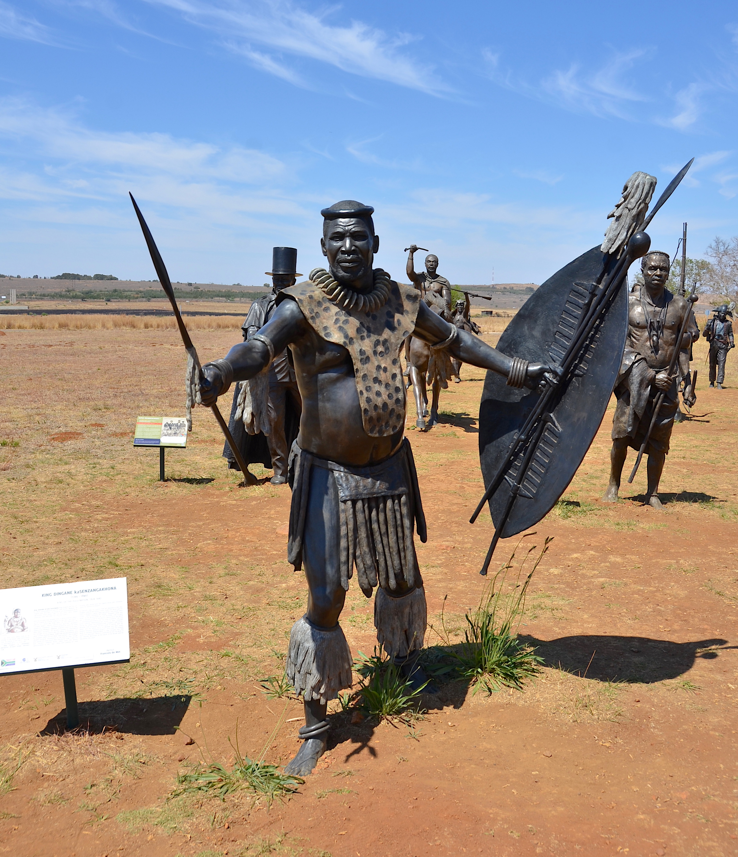 Zulu König Dingane kaSenzangakhona, Bronzefigur bei Maropeng, Südafrika